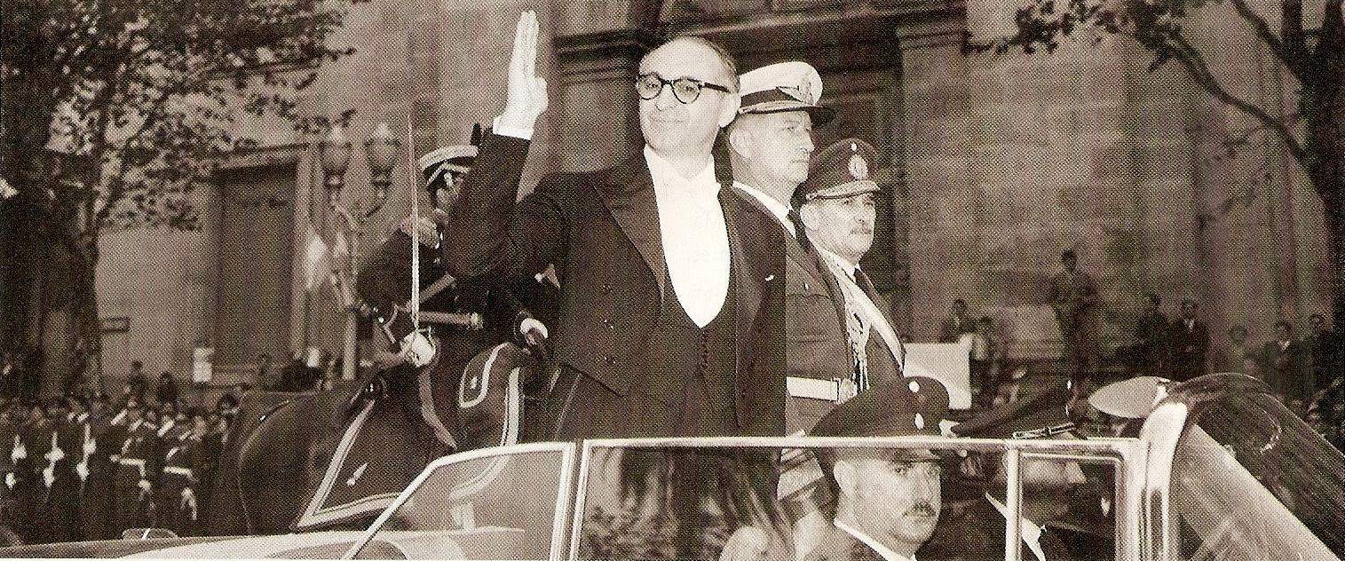 El recién electo presidente argentino Arturo Frondizi se dirige hacia la Casa Rosada desde el Congreso.